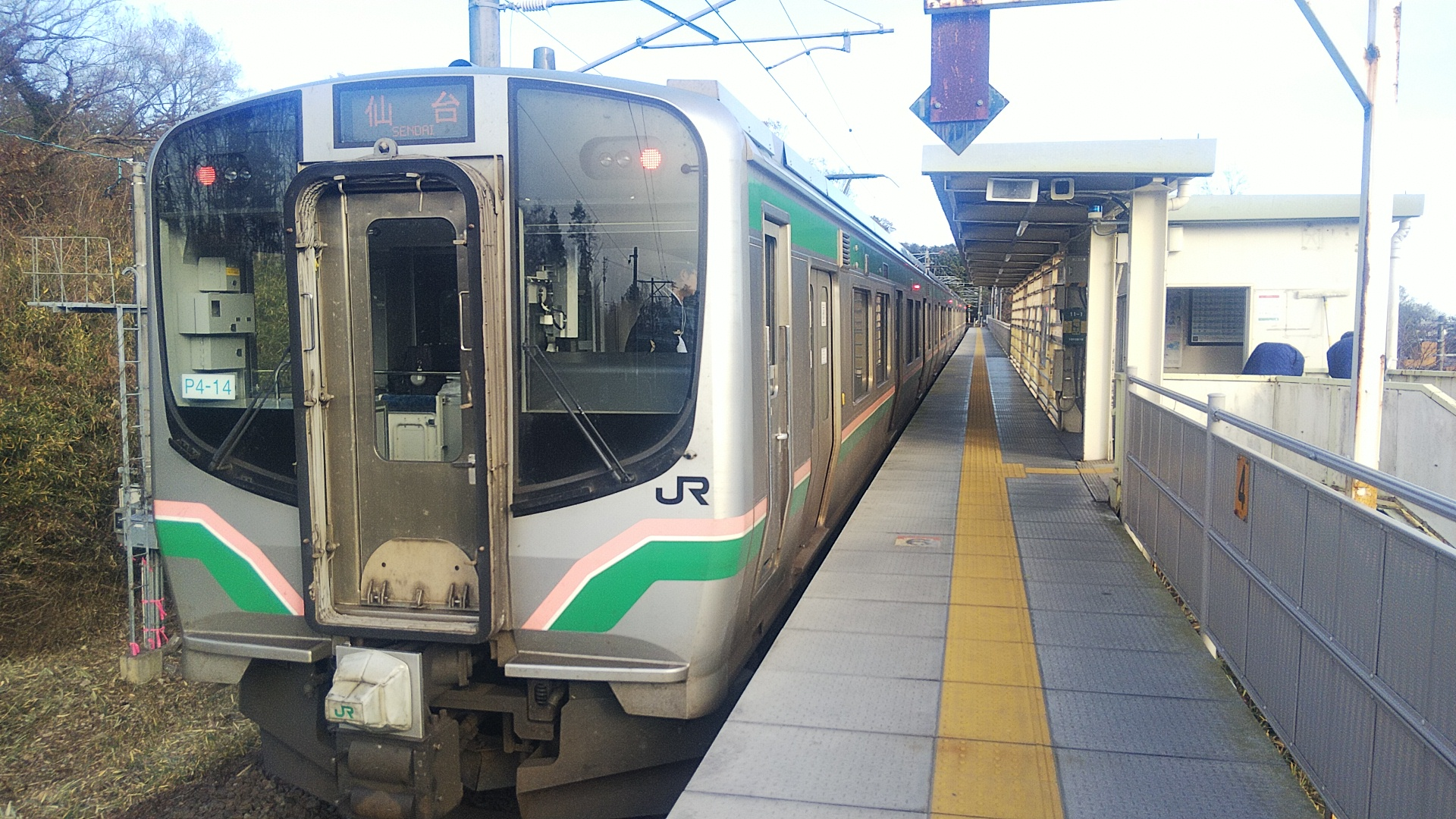 葛岡駅ホーム（2019年12月）